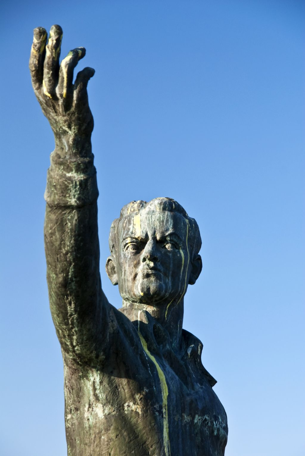 Srpski (latinica): Spomen obeležje u Radanovcima na mestu gde je ubijen Narodni heroj Žikica Jovanović Španac